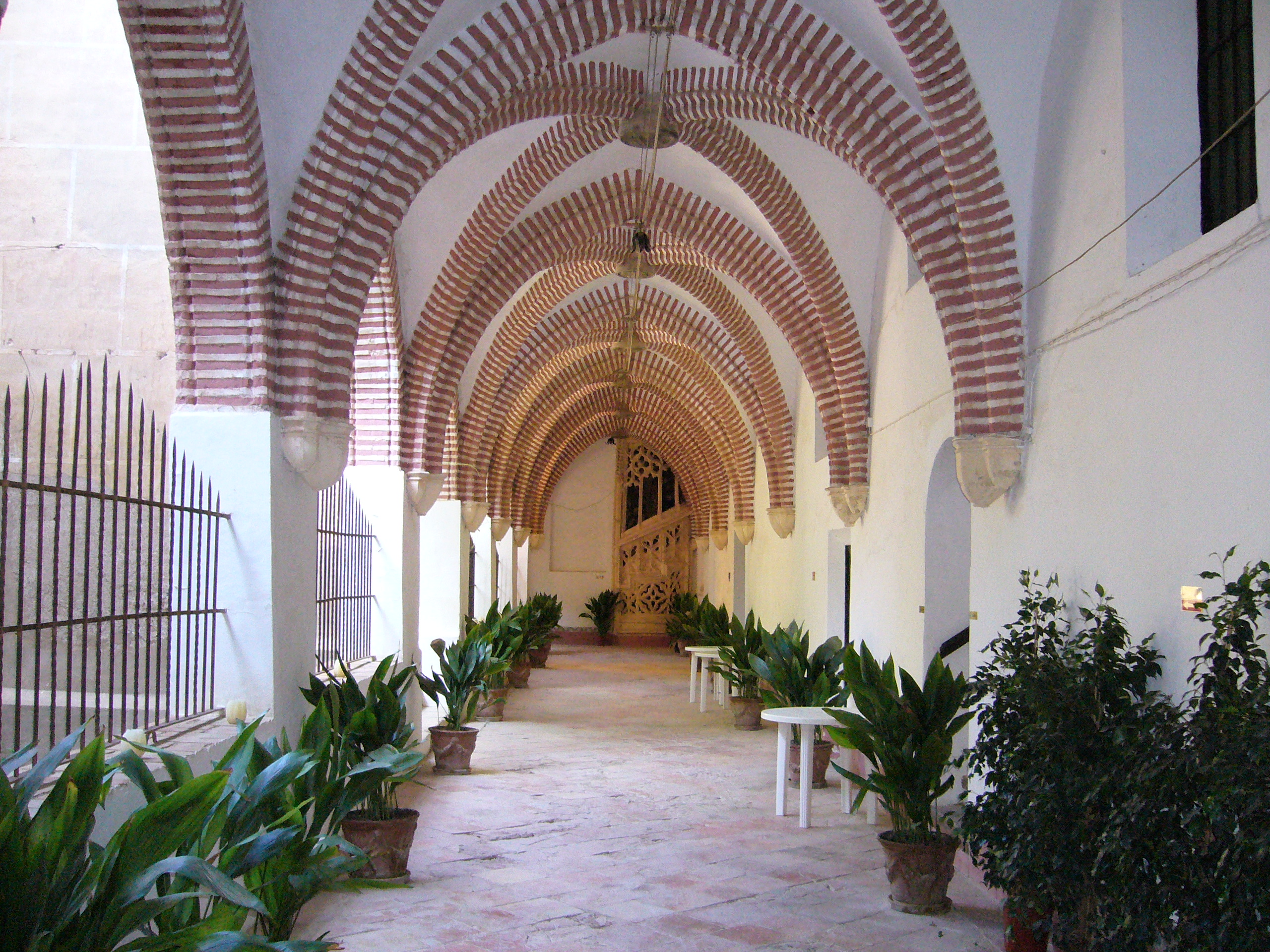 Lateral del Claustre del Monestir o Convent de Sant Jeroni de Cotalba. La Safor. País Valencià